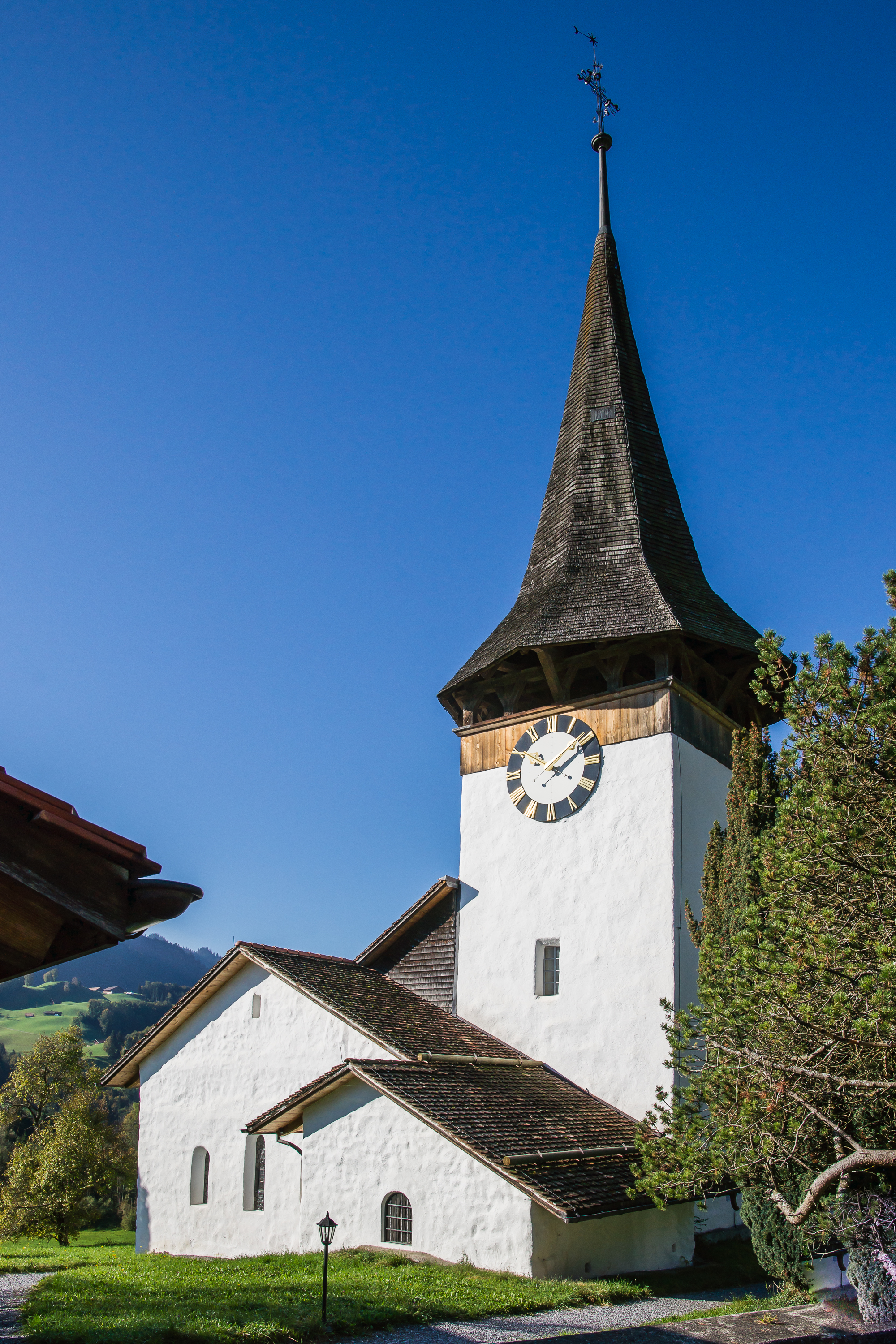 Reformierte Kirche von Norden